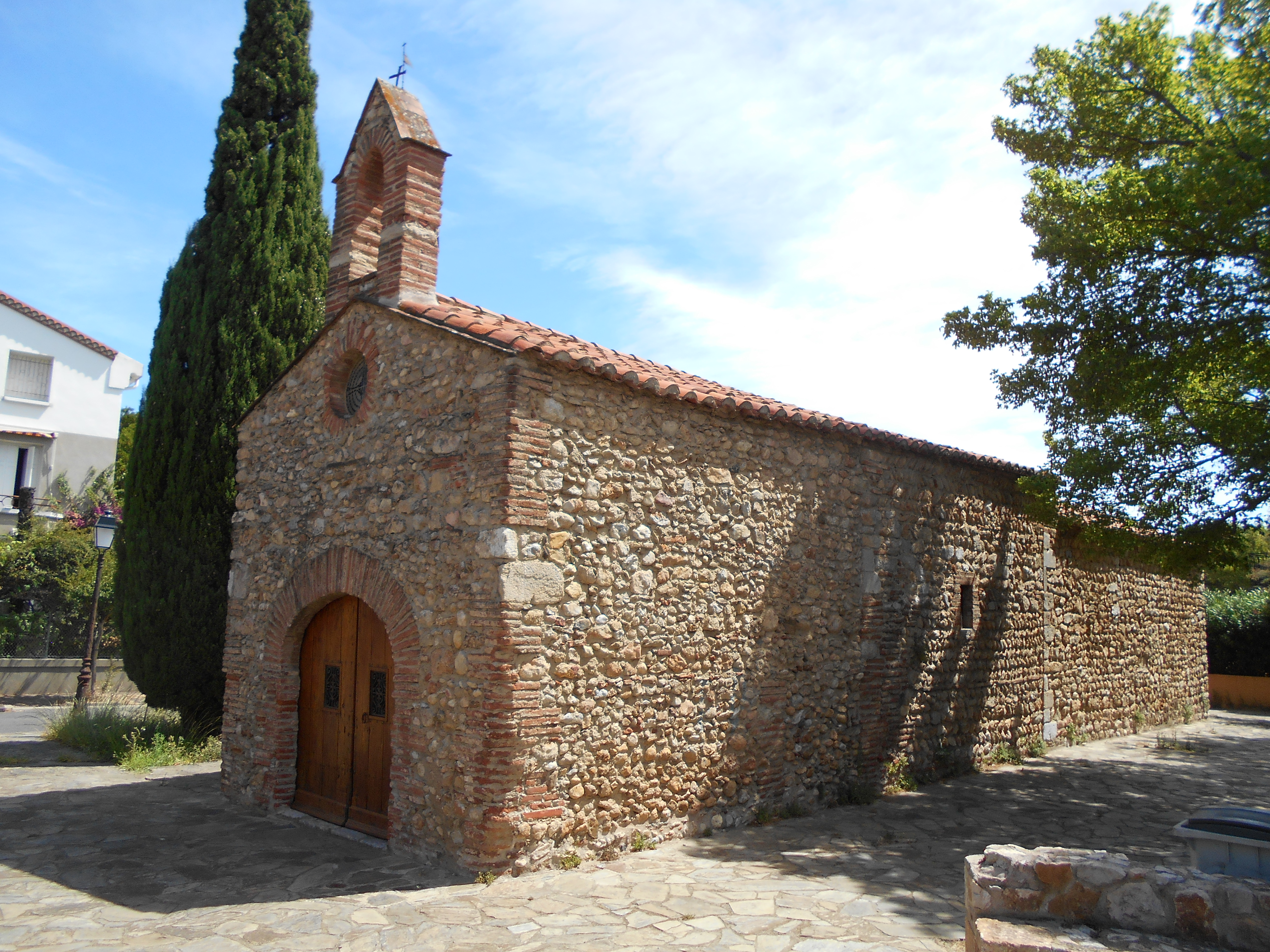 Sant Sebastià de Tuïr